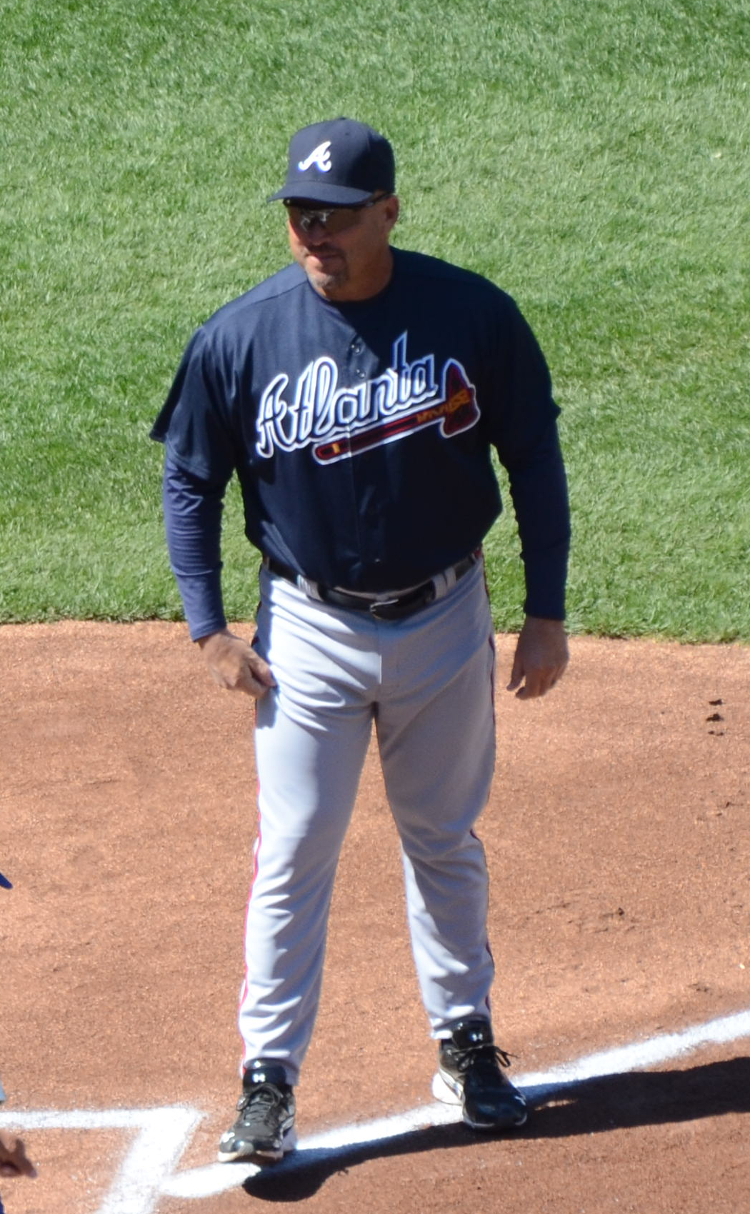 Fredi González